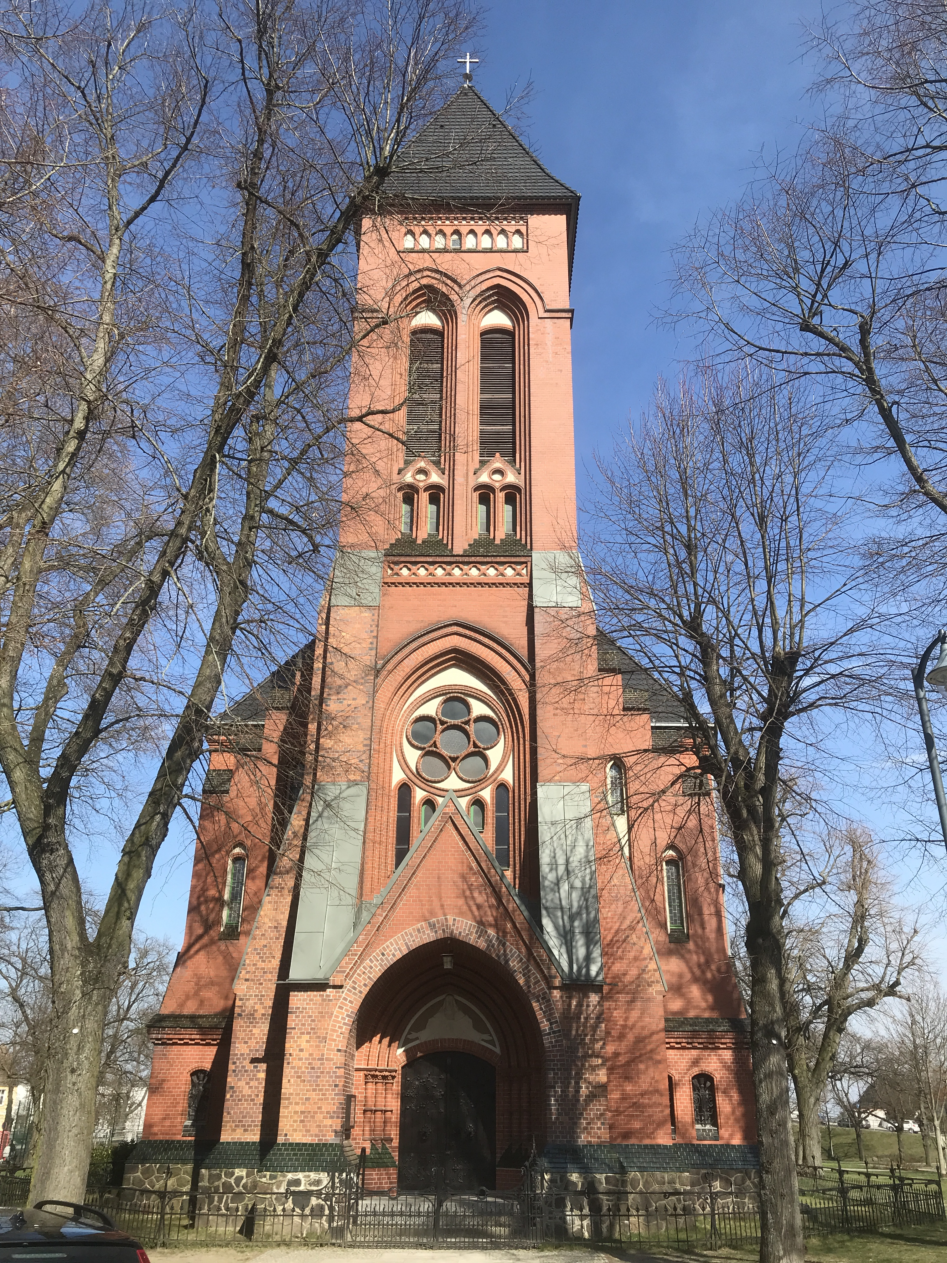 Die katholische Hallenkirche St. Johannis Baptist in Fürstenwalde/Spree in Brandenburg entstand in den Jahren 1905 und 1906. Die Kirchenausstattung ist bauzeitlich.